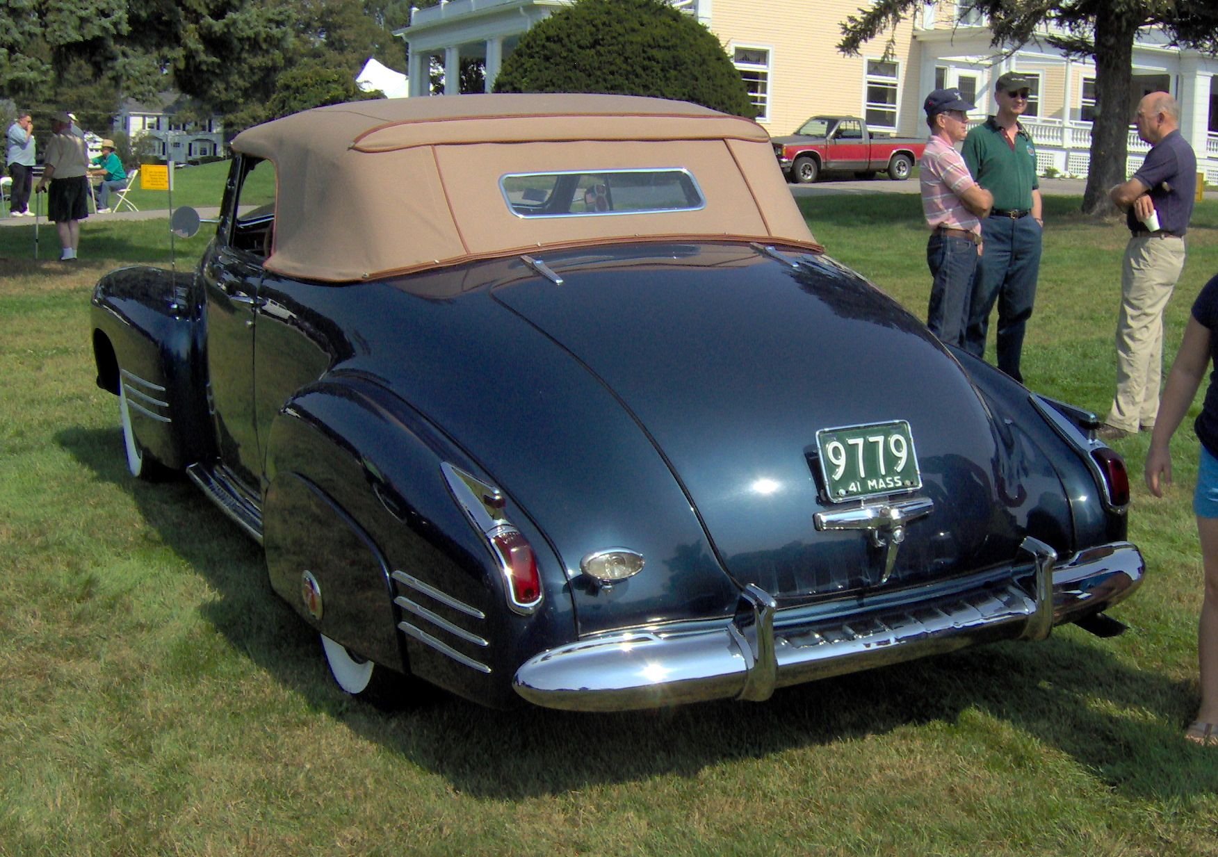 1941 Cadillac Series 62 convertible coupe